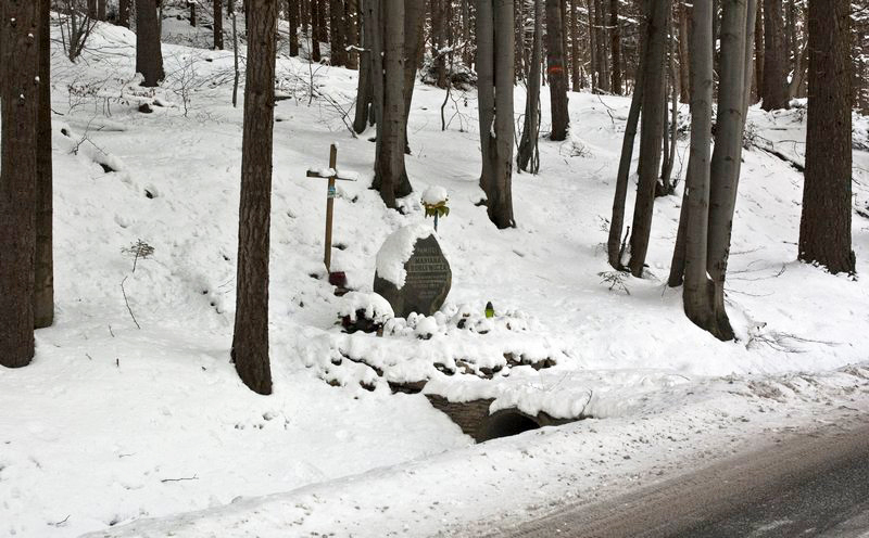 Pamięci Mariana Bublewicza Wybitnego kierowcy rajdowego w miejscu tragicznego wypadku 20 lutego 1993 r. Jego zespół i przyjaciele